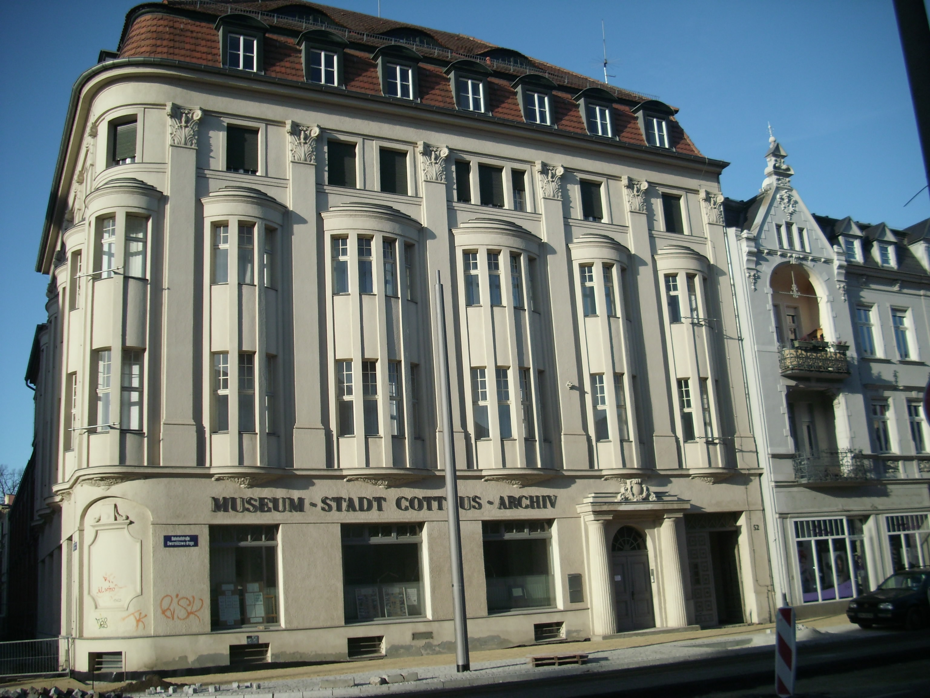 Bahnhofstrasse 52